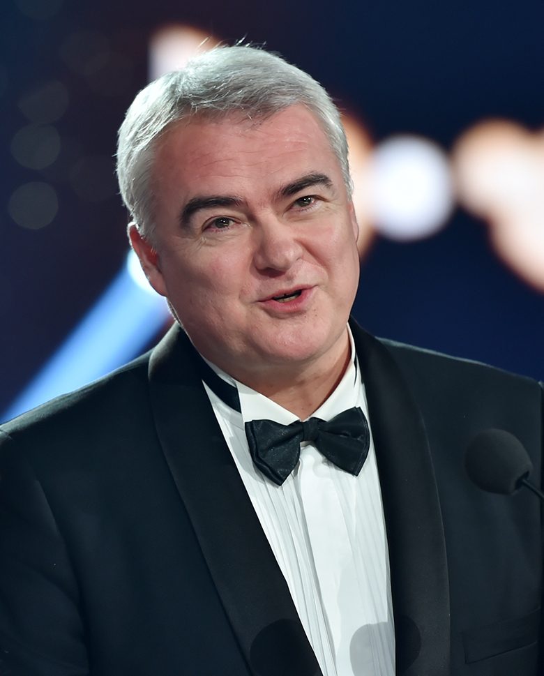 Miroslav Dvorský